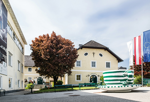 Gmundner Keramik Manufaktur